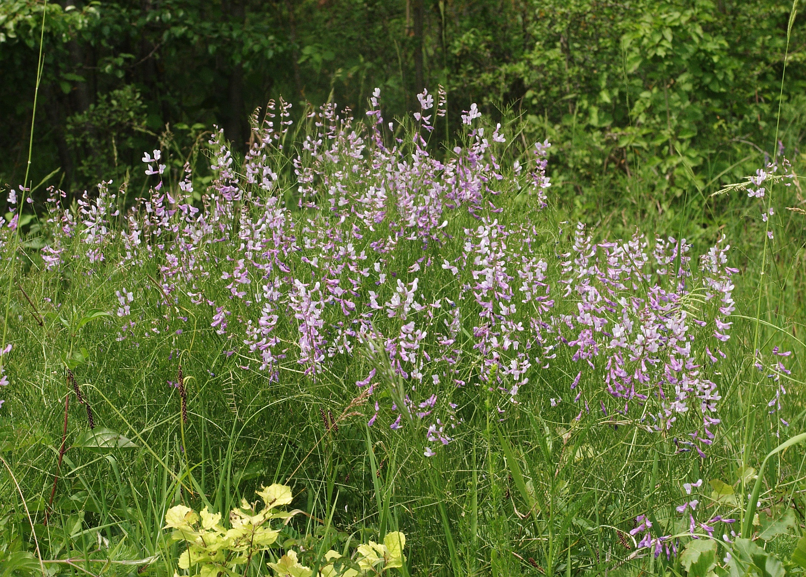 Vicia dalmatica, Tauberland, Germany